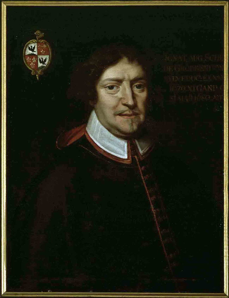 Portret van Mgr. Ignacius Augustinus Schetz De Grobbendonck; inv nr: 499/11